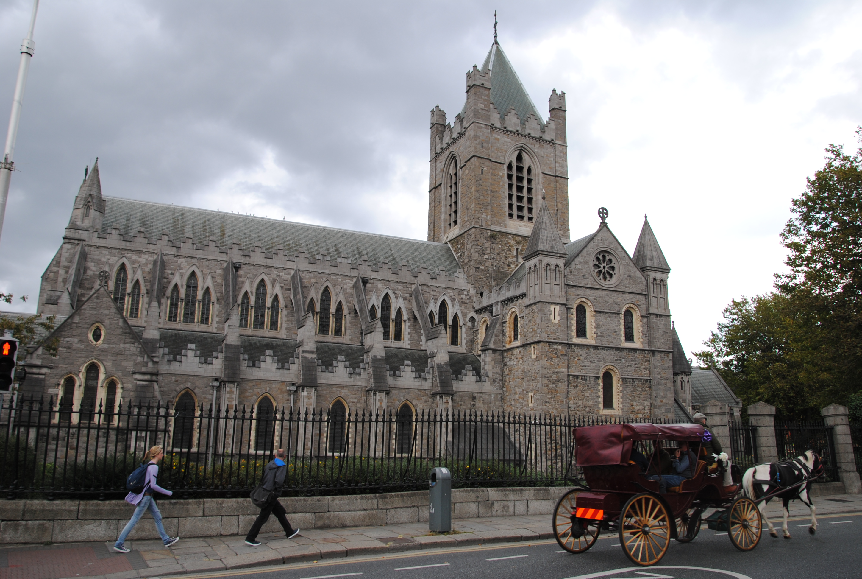 Dublin, Irlanda.